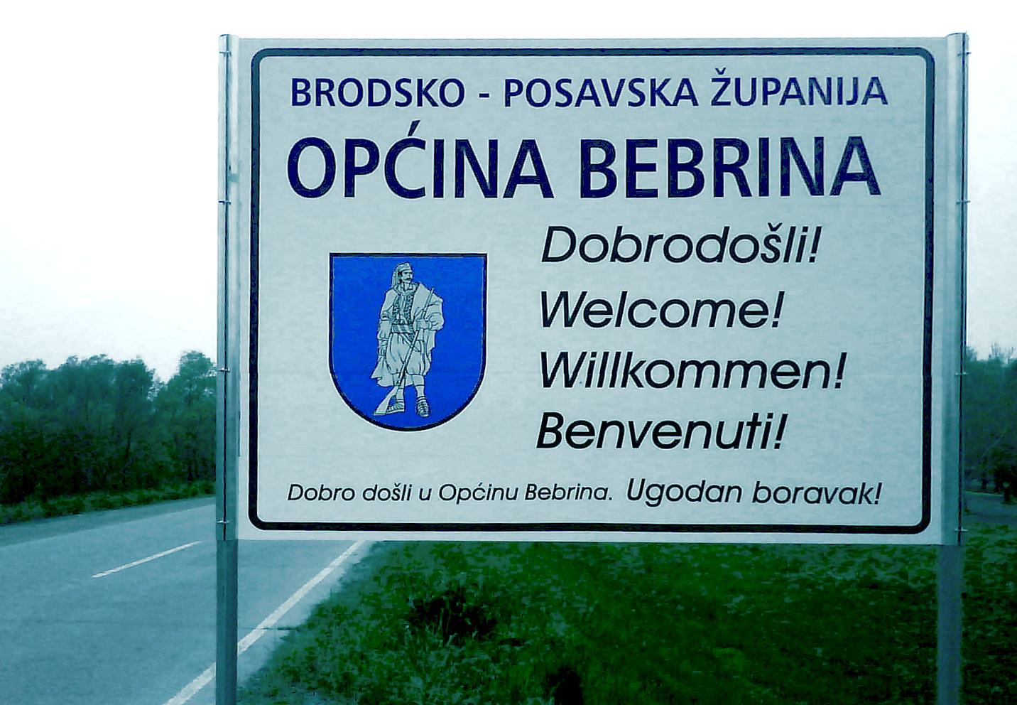 Ploča na ulasku u Općinu Bebrina